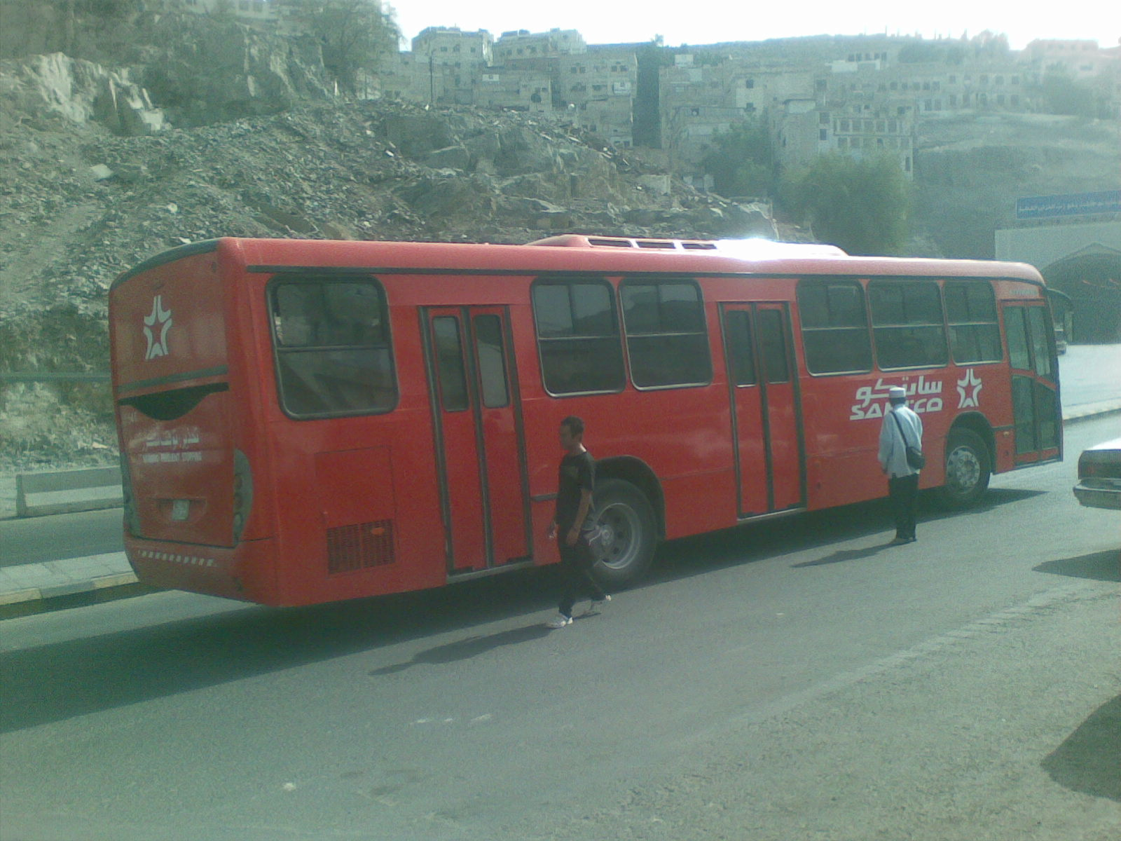 മക്ക നഗരത്തില്‍ സര്‍വീസ് നടത്തുന്ന സൗദി ട്രാന്‍സ്പോര്‍ട്ട് കോര്‍പറേഷന്‍ ബസ്